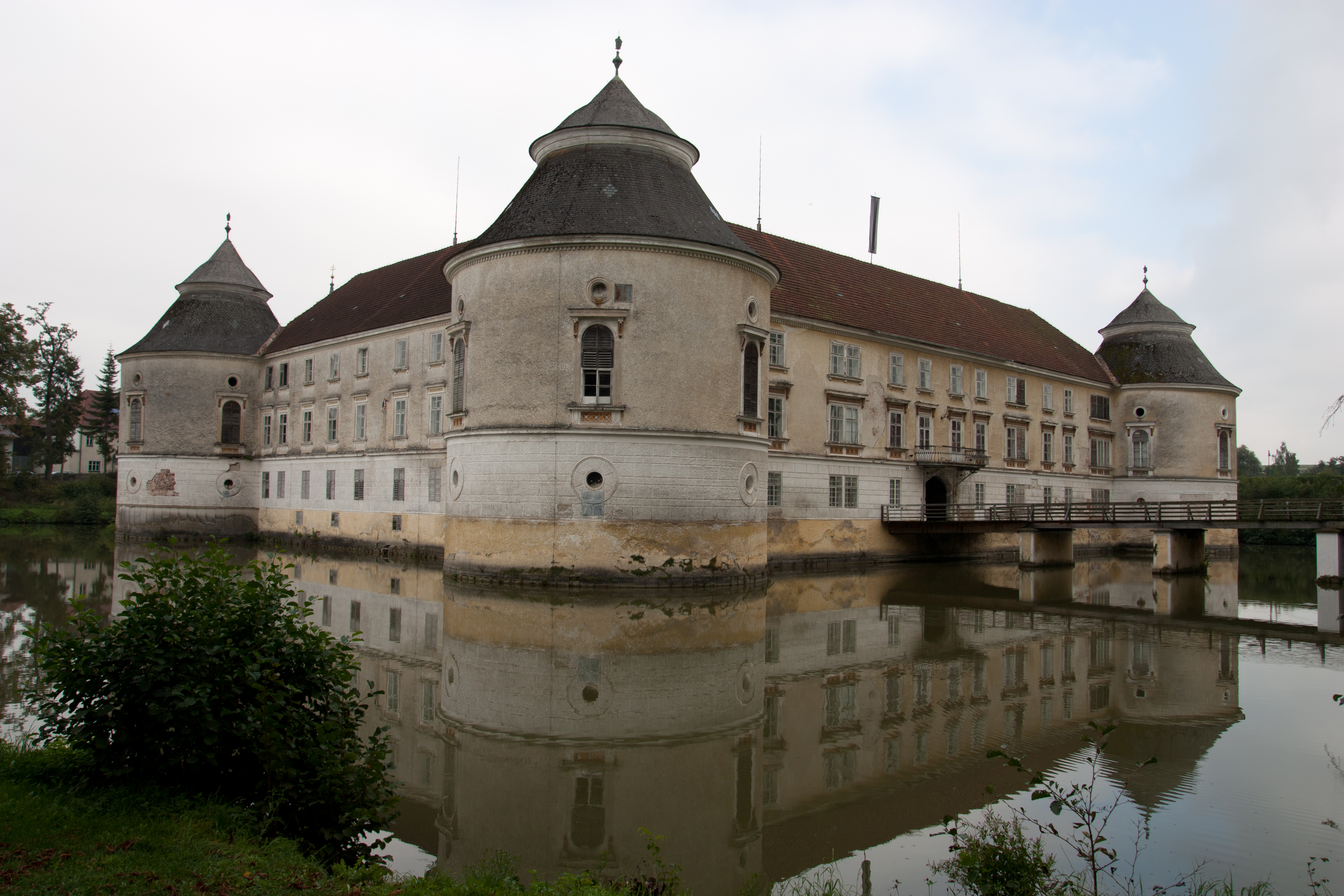 Wasserschloss Aistersheim